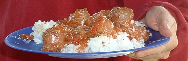 Photo personnelle de David Remi , Assiette de rougail saucisse.